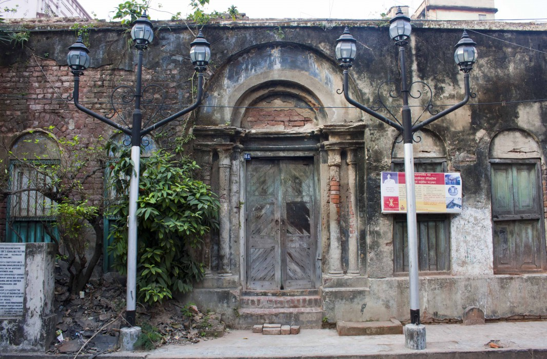 একজন অ্যাংলো-আইরিশ বংশোদ্ভুত সমাজকর্মী, লেখিকা, শিক্ষিকা এবং স্বামী বিবেকানন্দের শিষ্যা (২৮ অক্টোবর, ১৮৬৭ – ১৩ অক্টোবর, ১৯১১) এটি তাহার বাড়ি, যার বর্তমান ঠিকানা ১৬ ভগিনী নিবেদিতা সরণি কলকাতা - ৭০০০০২